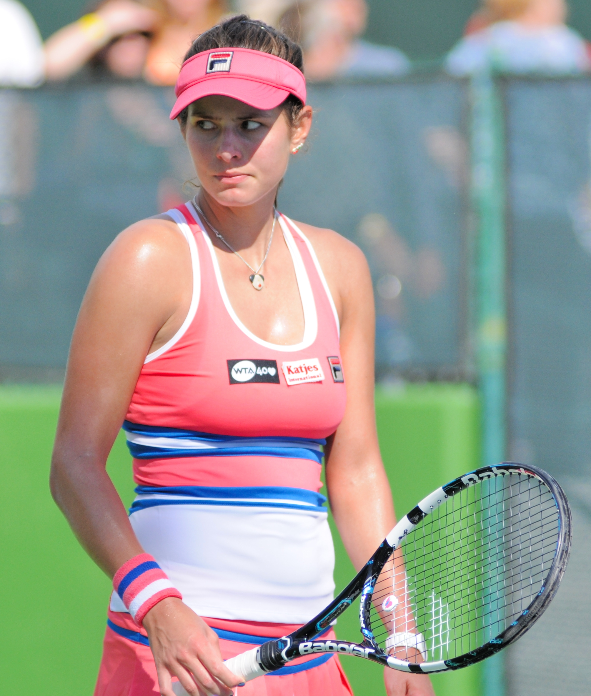 BNP Paribas Open 2013